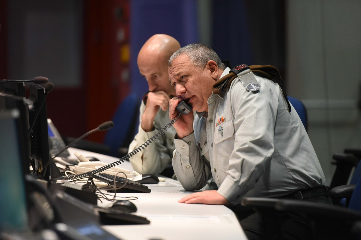 הרמטכ"ל ורל"ש הרמטכ"ל במהלך אירוע מבצעי